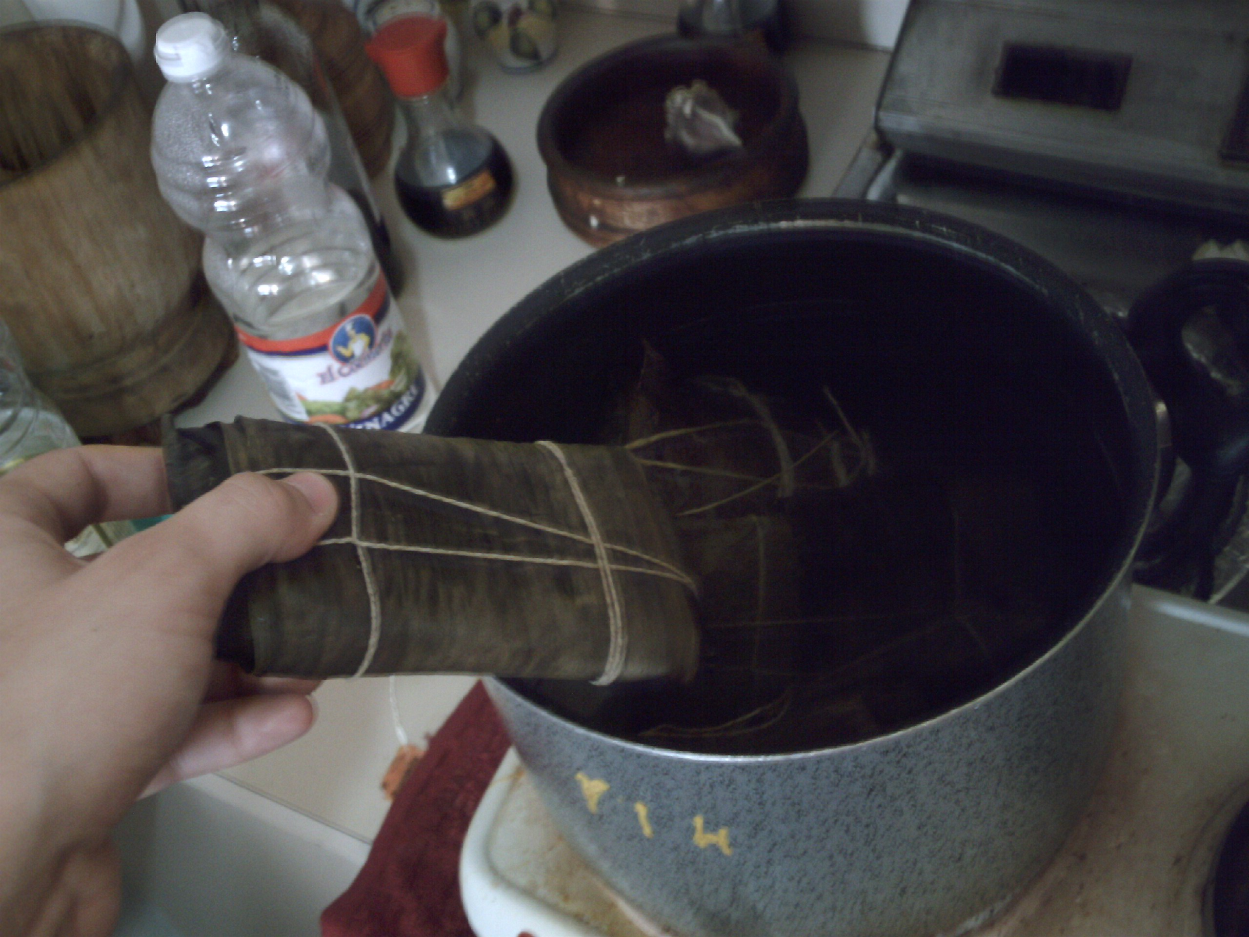 Preparación de una Hallaca, comida típica Venezolana